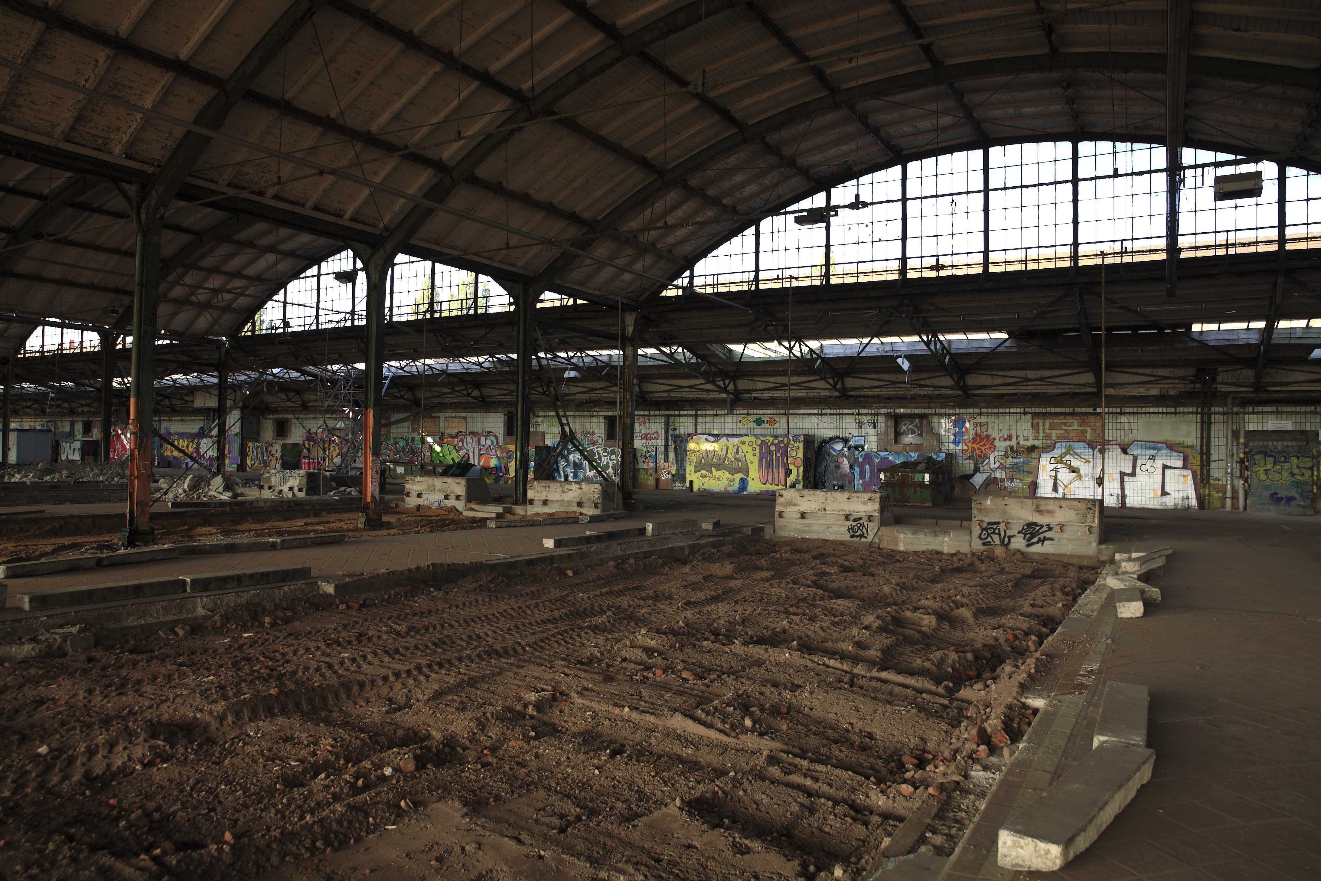 Die Prellböcke sind feste Betonblöcke, Bremsprellböcke hätten Platz gekostet. Sie waren auch nicht notwendig, der Postbahnhof wurde nur mit Rangierfahrten bedient.